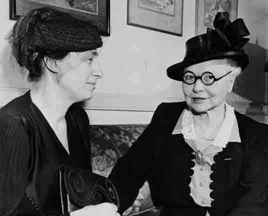 Als presidente van de Medical Women's International Association in gesprek met haar voorgangster, Dr. Esther Lovjo (r.). Foto door onbekende fotograaf, 1948 (coll. Atria)